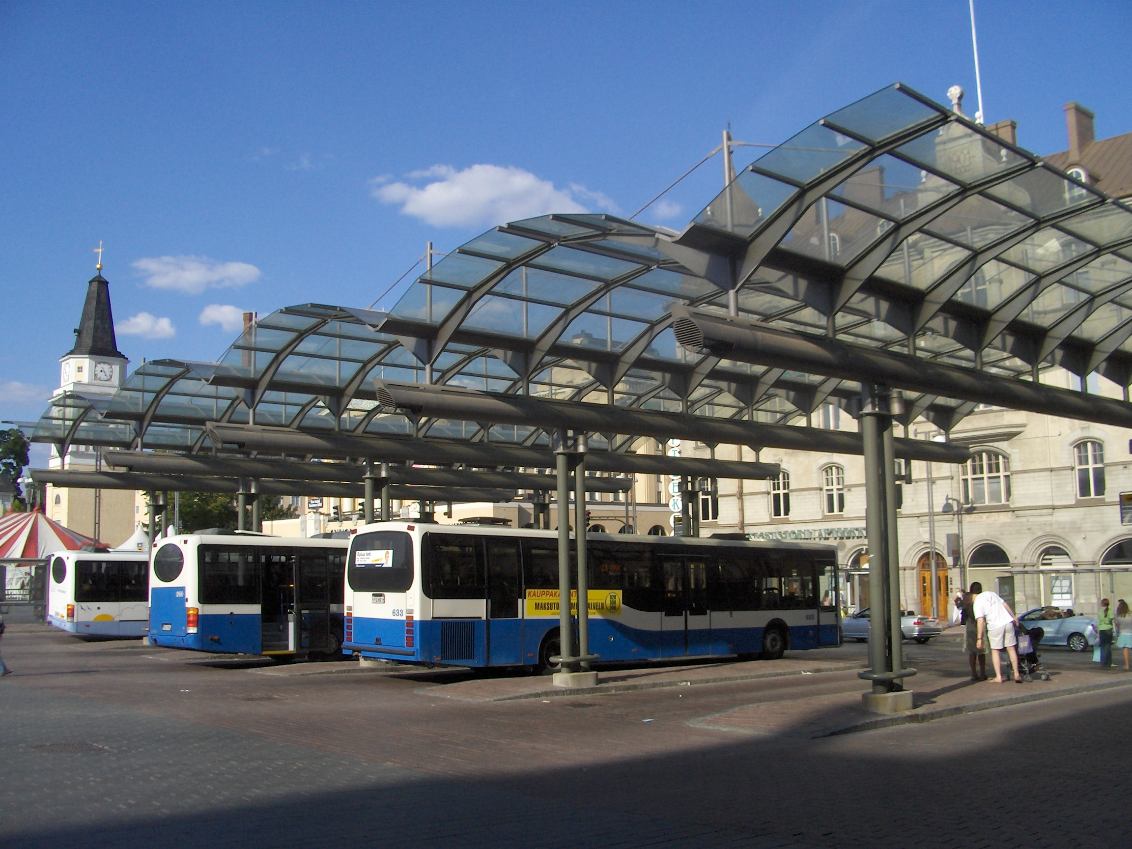 Bus terminals at Keskustori in Tampere.